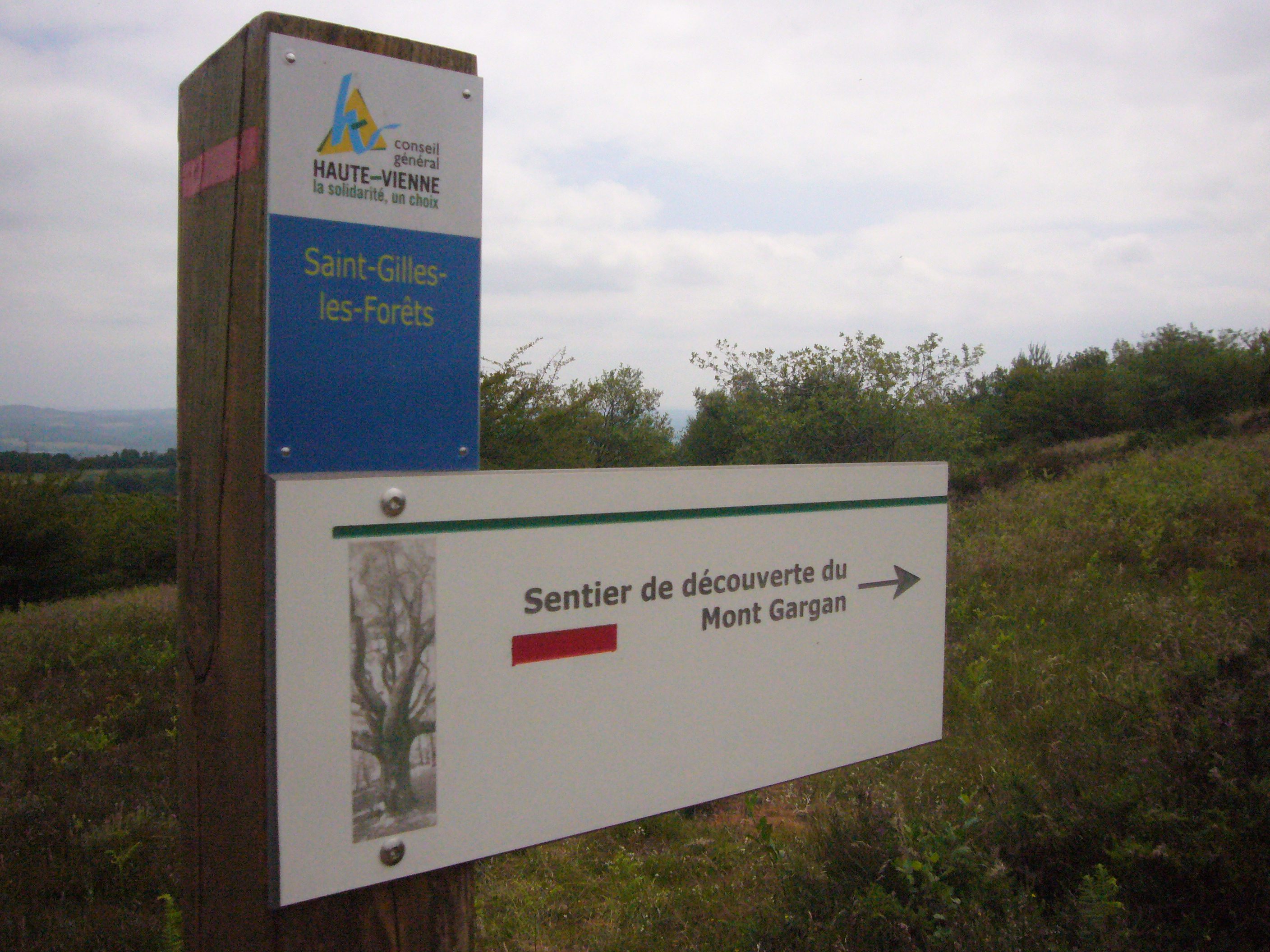 Panneau balisant le sentier de découverte du Mont Gargan (Haute-Vienne, France)